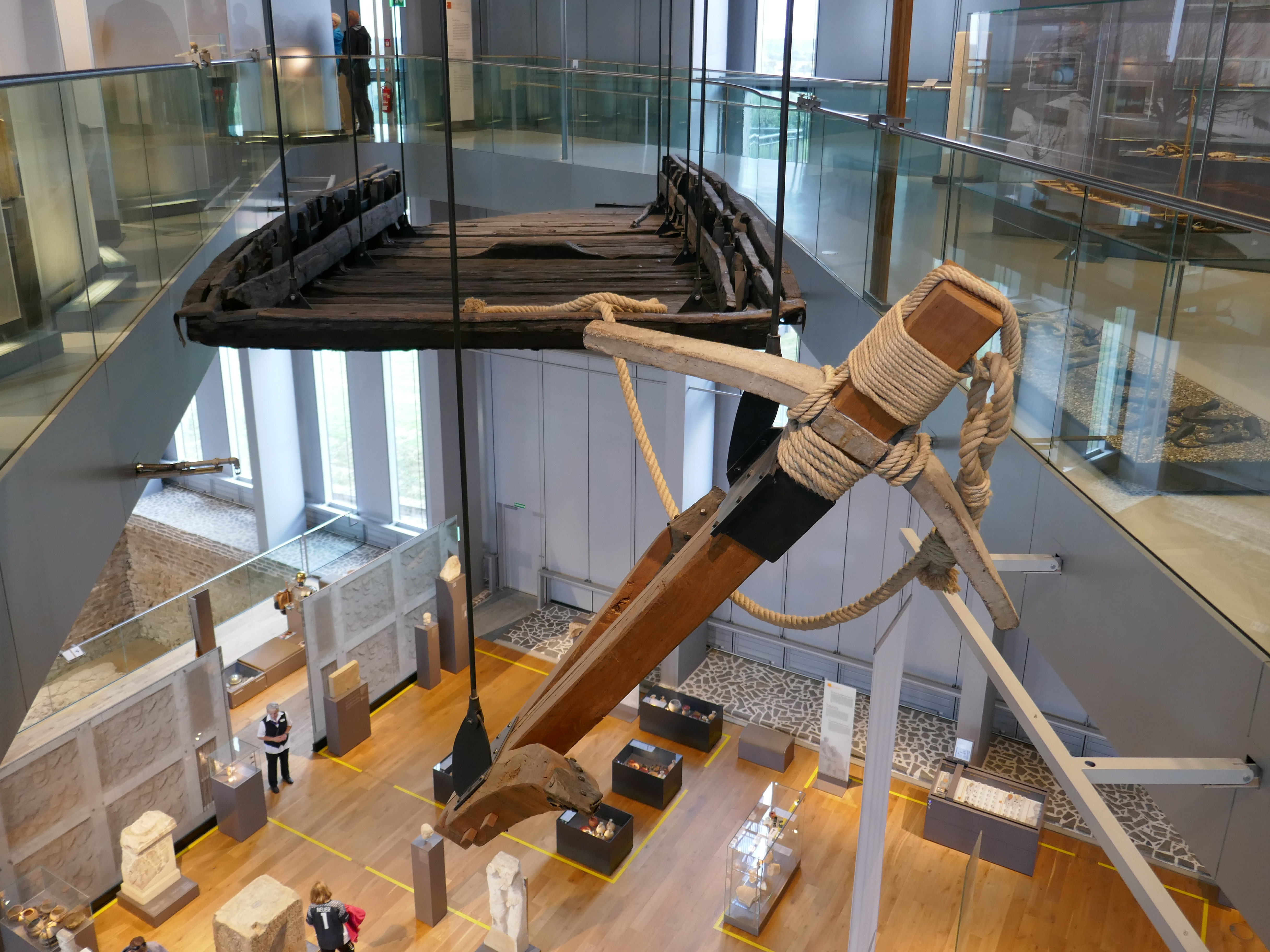 GLAM on Tour/Wikipedia trifft...die Colonia Ulpia Traiana im LVR-Archäologischen Park Xanten - Die Ausstellung - Anker und Plattbodenschiff (Prahm).